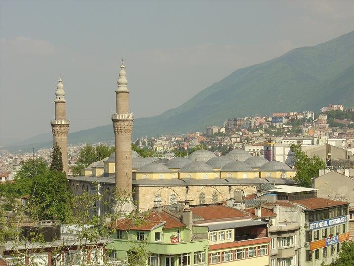 Lisans